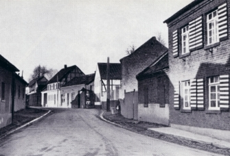 Garsdorf Foto by Bürgerverein Auenheim